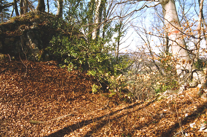 Halsgraben im Bereich der Ruine Itkon, Sissach, vermutlich prähistorische Zeitstellung